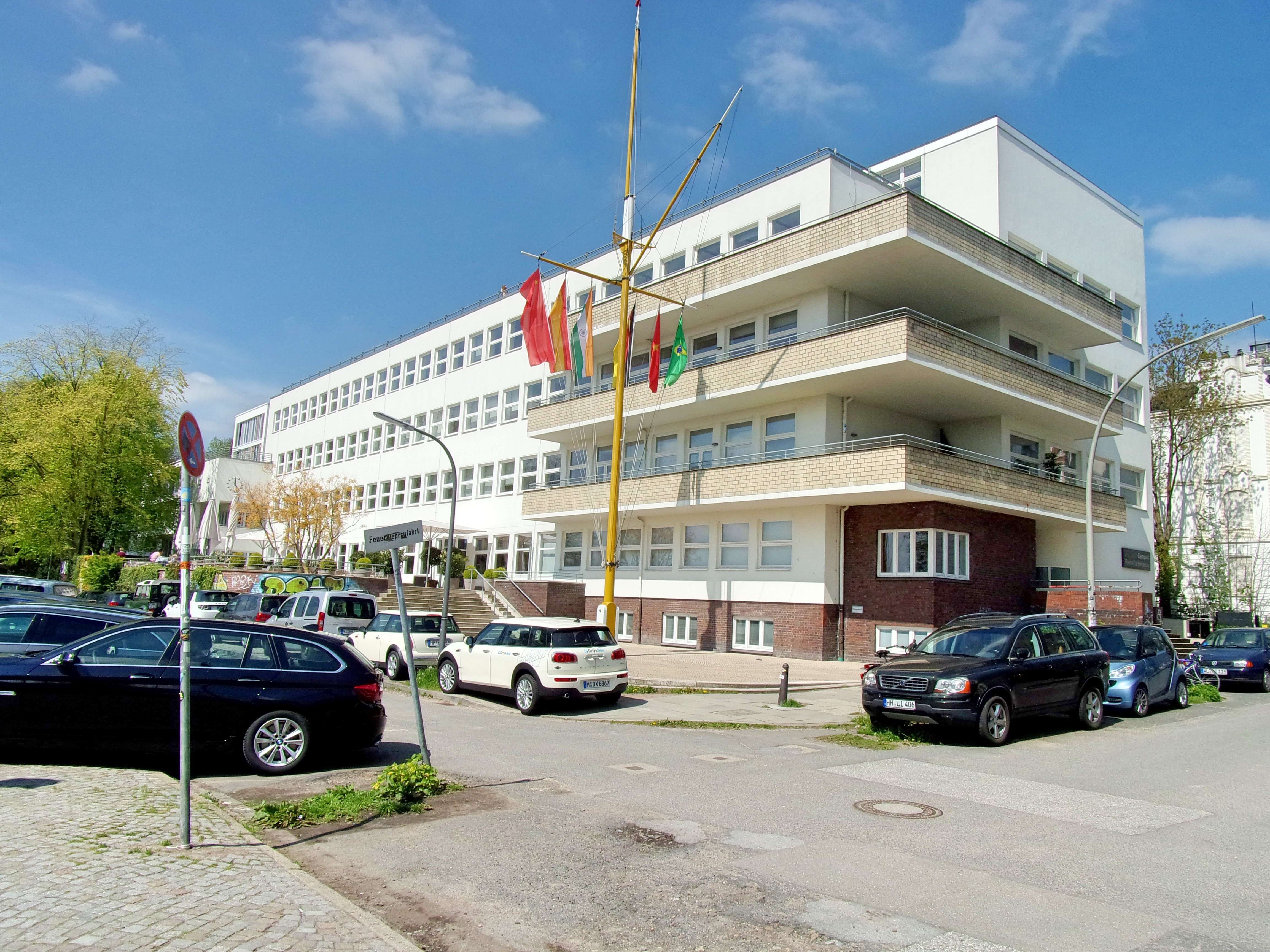 Rainvilleterrasse 4, die ehemalige Seefahrtsschule mit Ansicht an der Südseite.Das Gebäude beherbergt heute u. a. die Academy for Architectural Culture, der „Brand Academy – Hochschule für Design und Kommunikation“ sowie der „Design Factory International – College of Communication Arts and Interactive Media“ . Mehr zur Nachnutzung des Gebäudes unter folgendem Link: This is a photograph of an architectural monument.